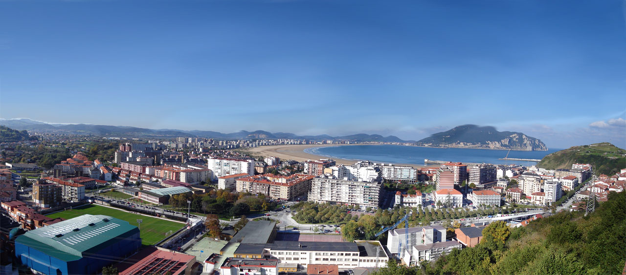 Foto desde el Hotel Risco